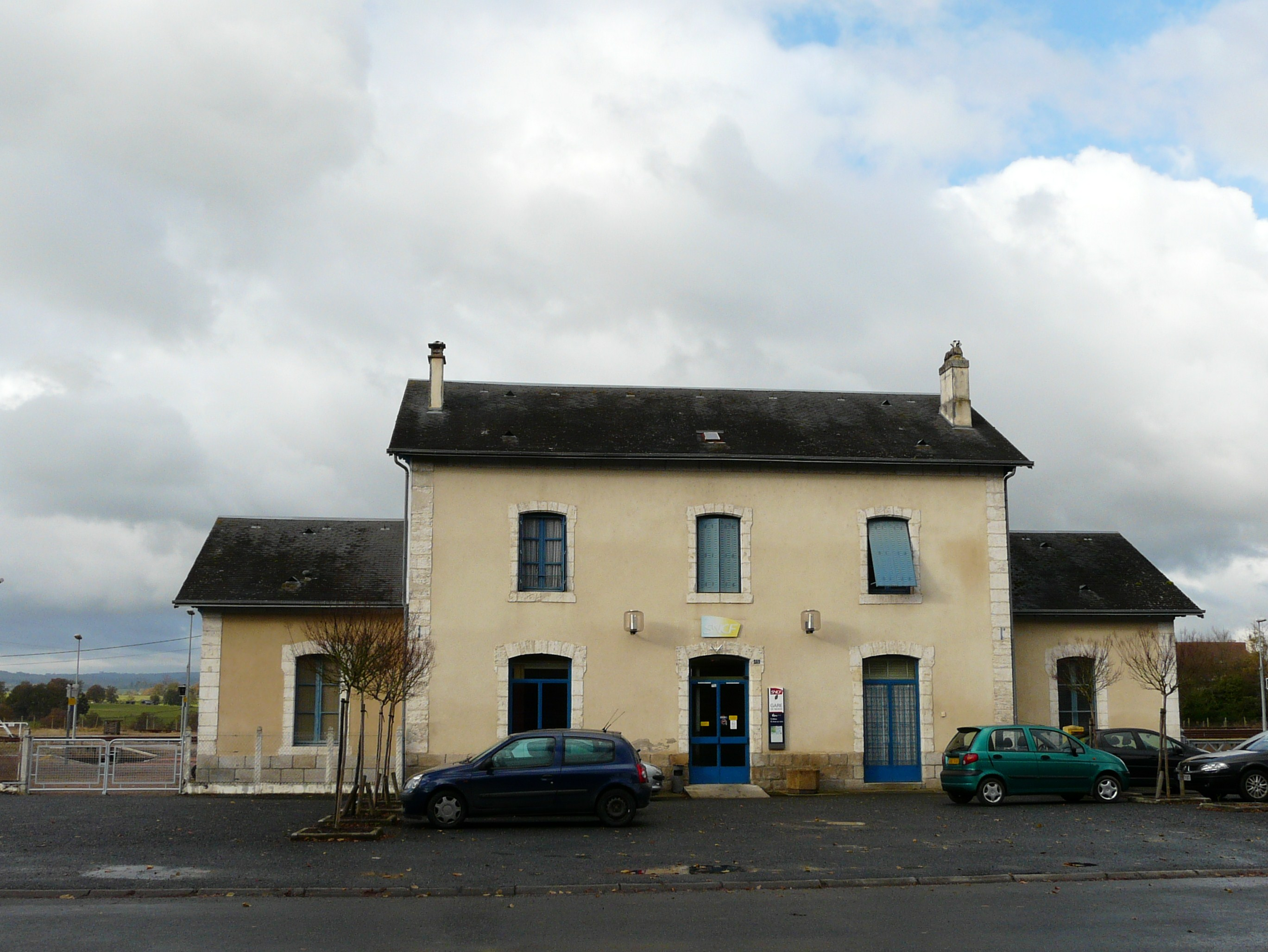 Le bâtiment voyageurs de la gare de Nexon, Haute-Vienne, France.